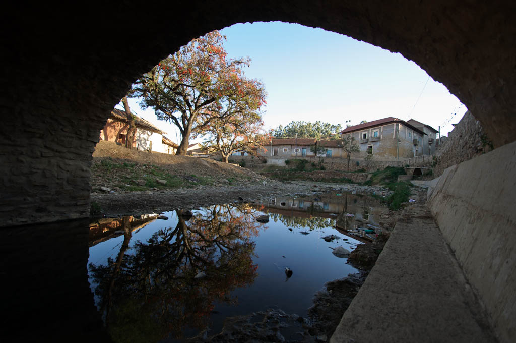 Esta foto se tomó el 28 de julio, 2011 en Totora, Cochabamba, Bolivia, con una Nikon D90.